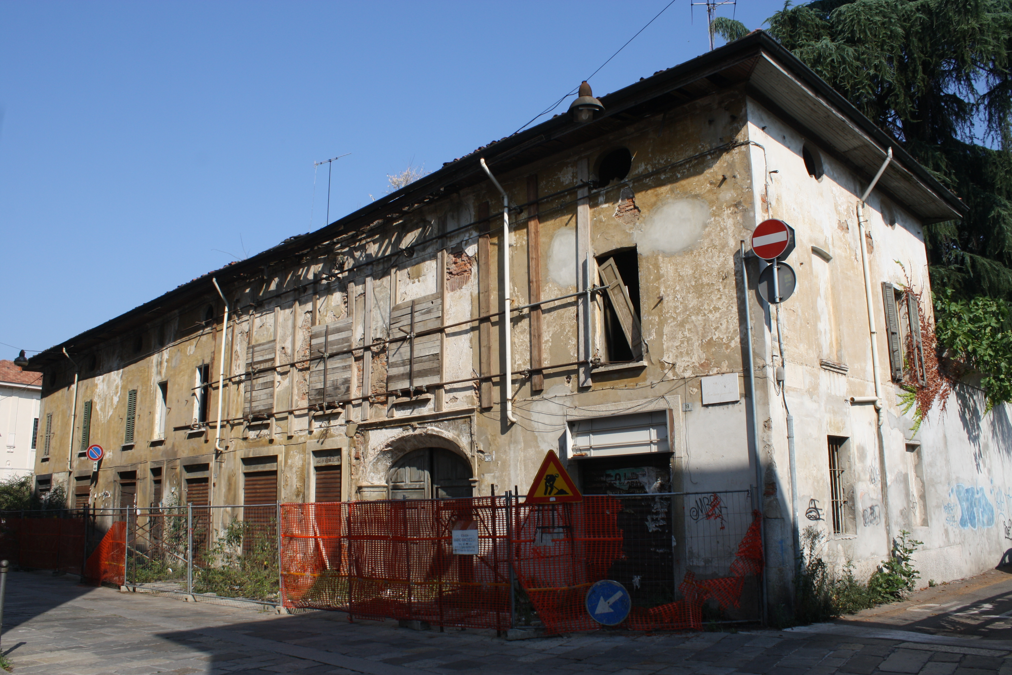 Il "Conventino" (casa Canavesi-Bossi) in via Giacomo Matteotti a Busto Arsizio.